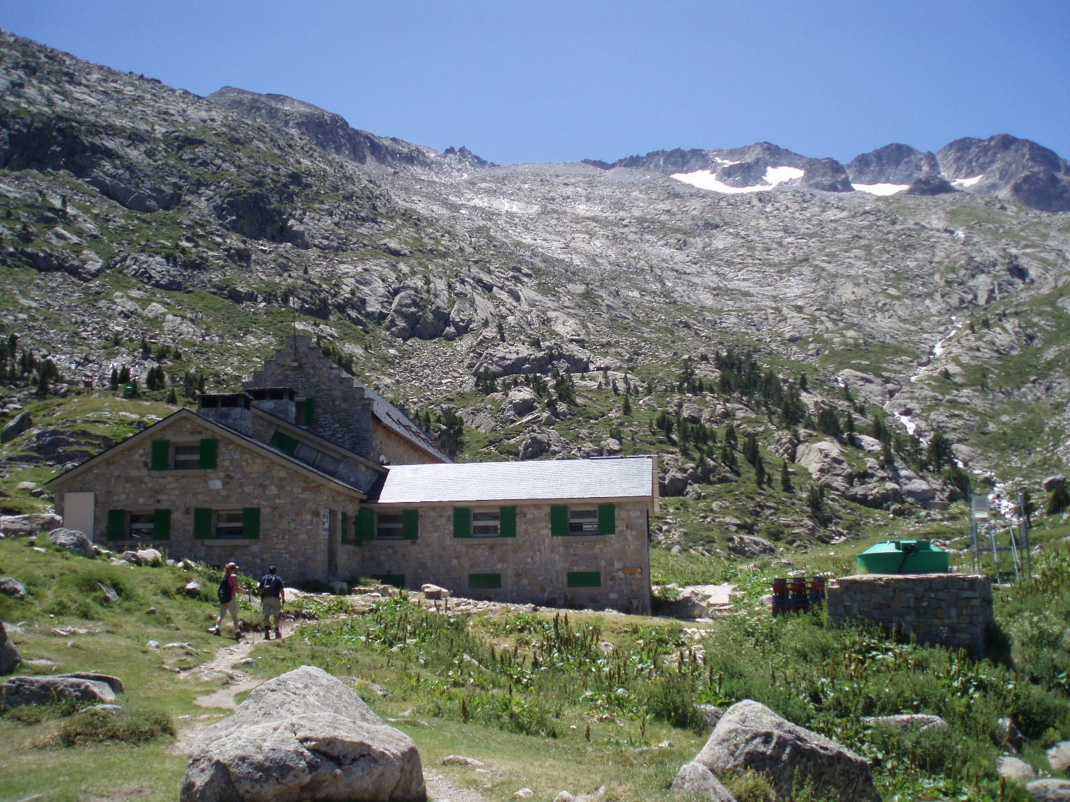 Refugio de montaña de la Renclusa (Pirineos, España).